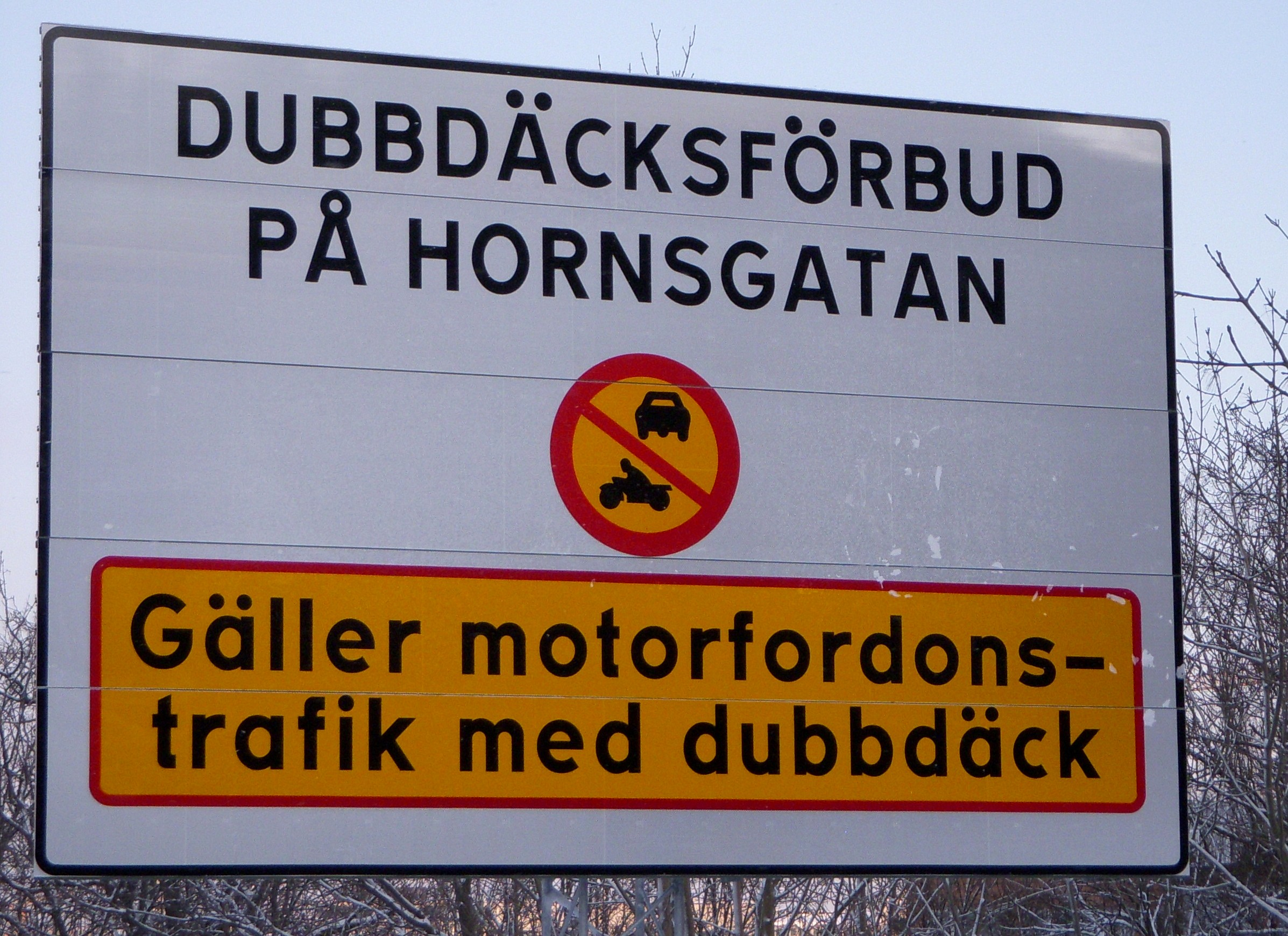 Skykt vid Liljeholmsbron "Dubbdäcksförbud på Hornsgatan"